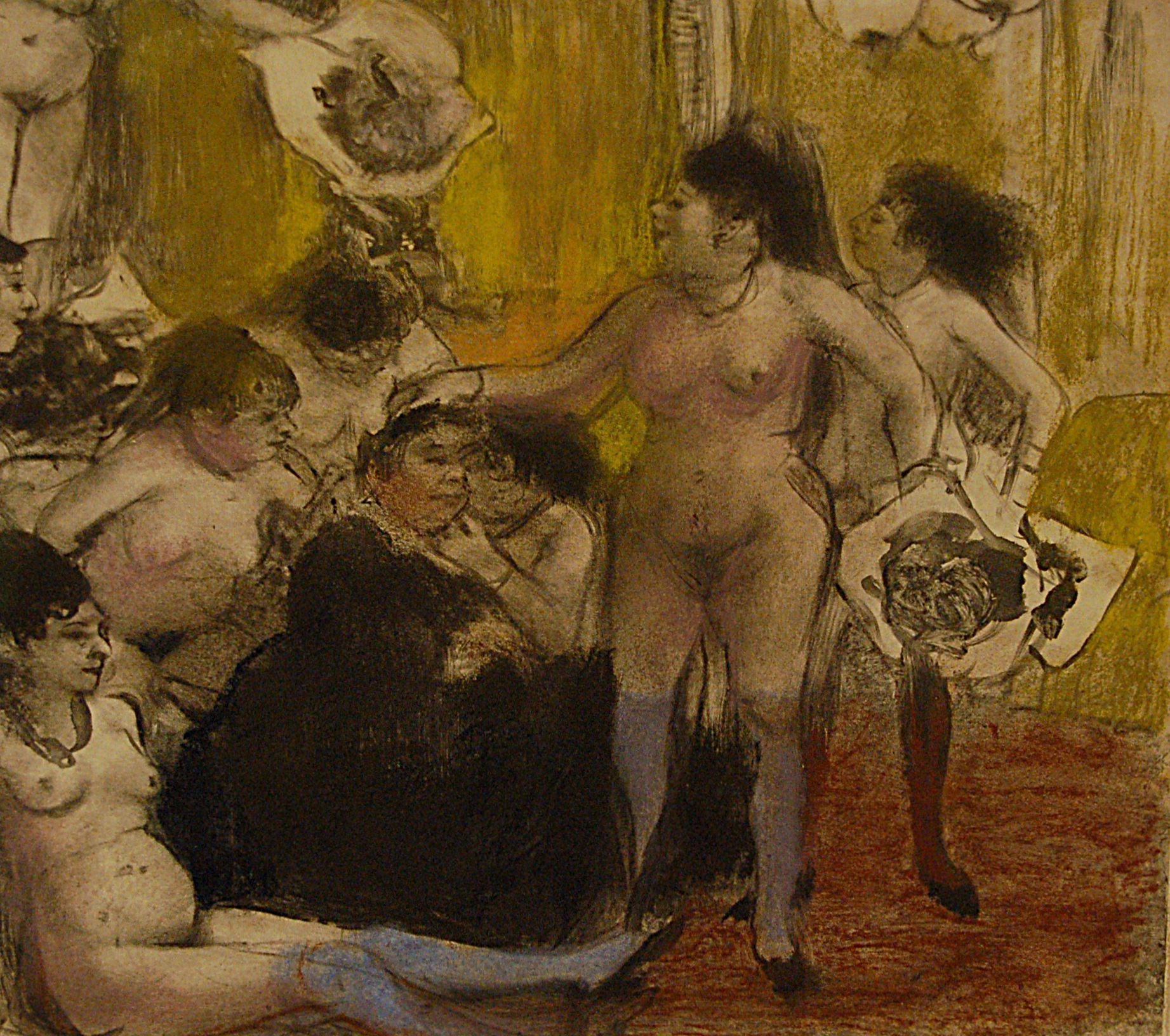 1878-1879 Monotype à l'encre noire sur papier, réhaussé de pastel Musée Pablo Picasso